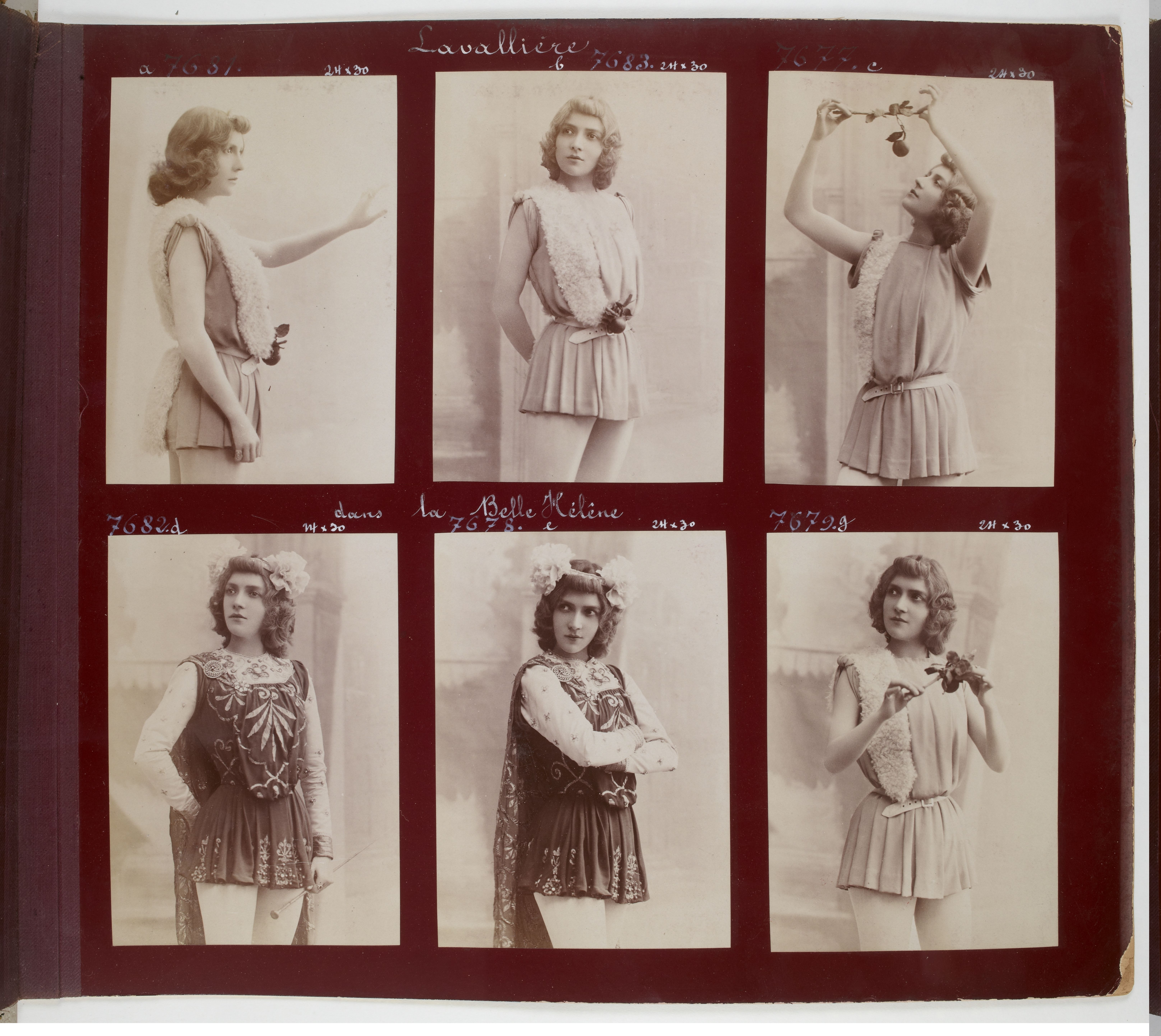 Album Reutlinger de portraits divers, vol. 2. Ève Lavallière dans "La Belle Hélène".